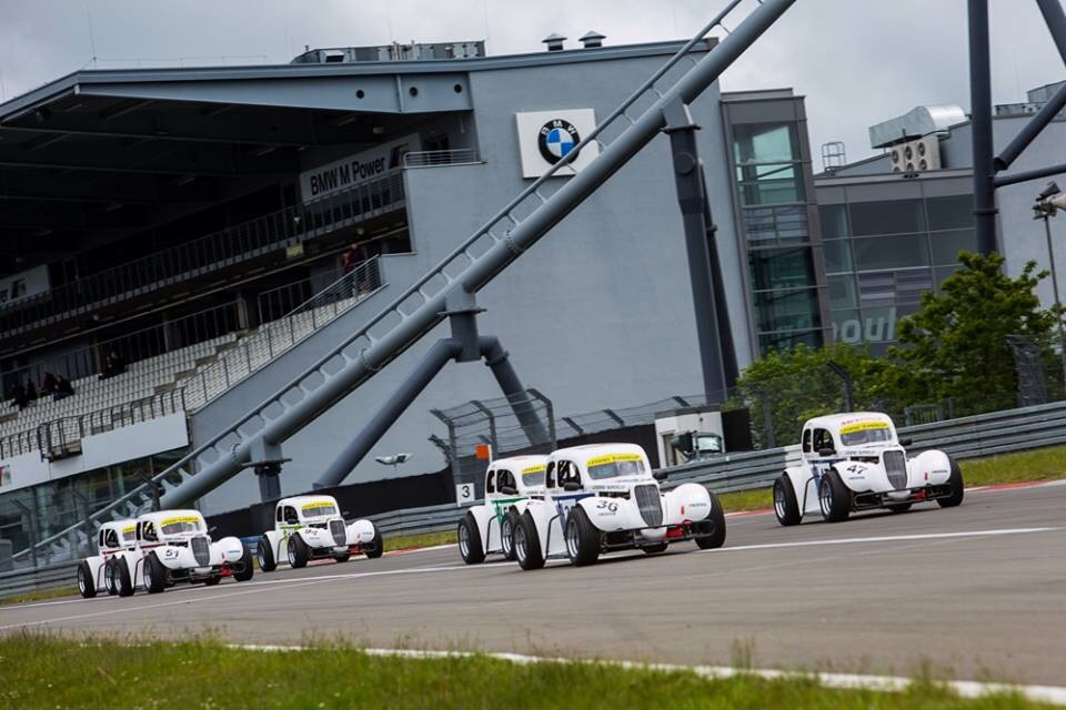 Nurburgring 2014 Legend Supercup